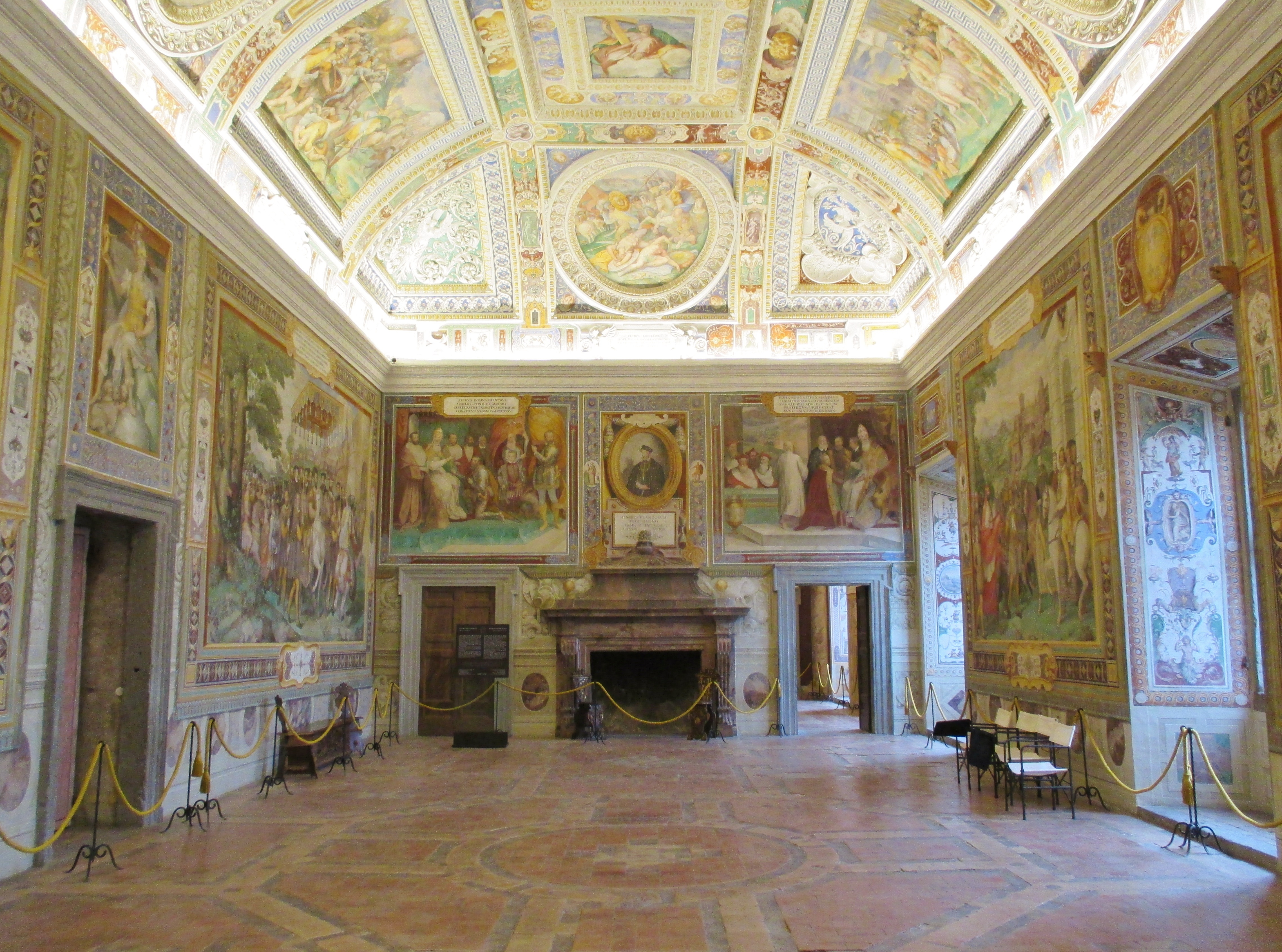 Caprarola, villa Farnese: sala dei Fasti Farnesiani